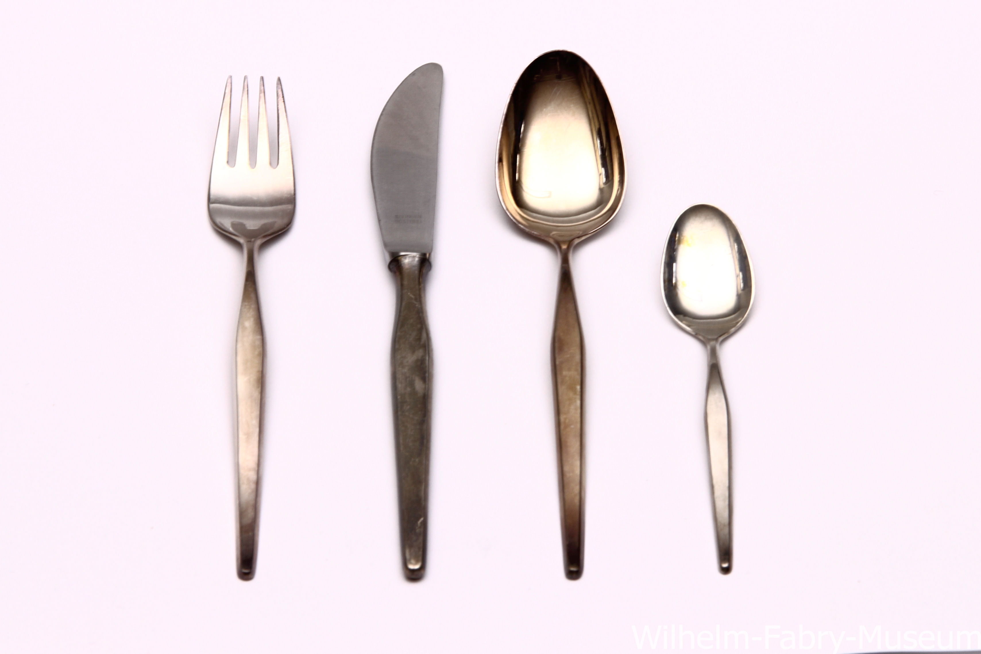 Ansicht Bestecke Heimendahl & Keller